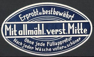 Präge-Reklamemarke: Erprobt u. bestbewährt. Mit allmähl. verst. Mitte. Ohne jede Füllappretur. Nach jeder Wäsche voller u. schöner.